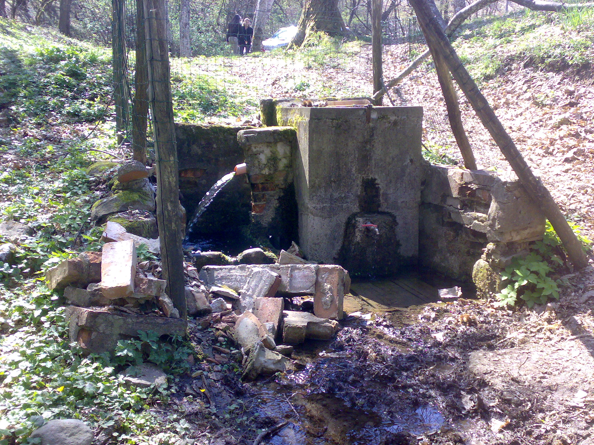 Fonte alla capra (Monte Giovi - Pontassieve)